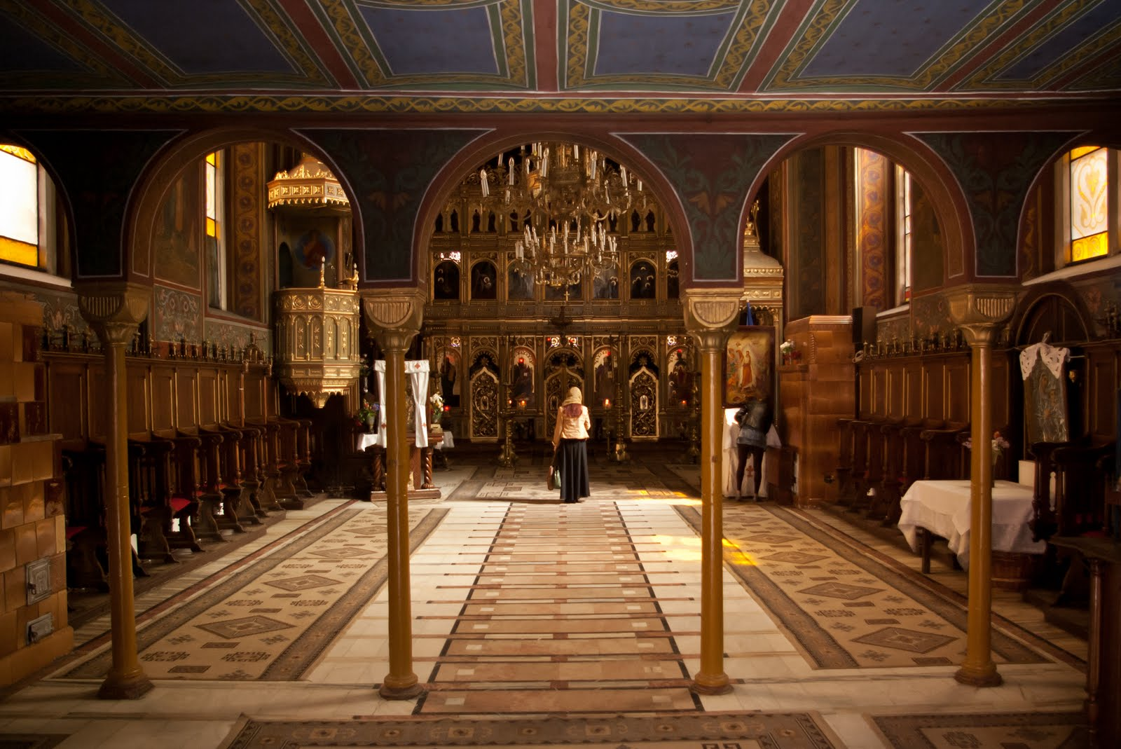 Fotografia prezinta o vedere interioara a Bisericii "Adormirea Maicii Domnului" din Brasov.